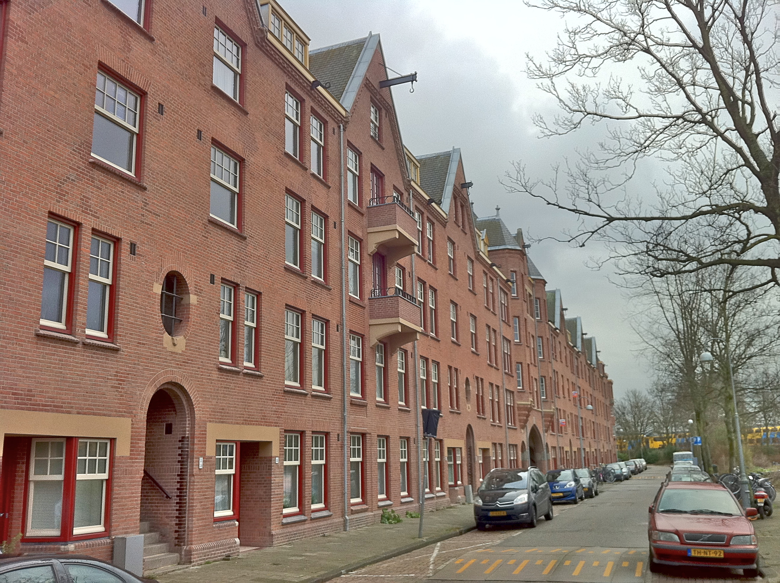 Spaarndammerdijk 240, Amsterdam-West, Spaarndammerbuurt, Zaanhof. Sociale woningbouw van woningbouwvereniging Patrimonium. Architecten Tj. Kuipers en A.U. Ingwersen, ontworpen in 1915-1916, voltooid 1919.